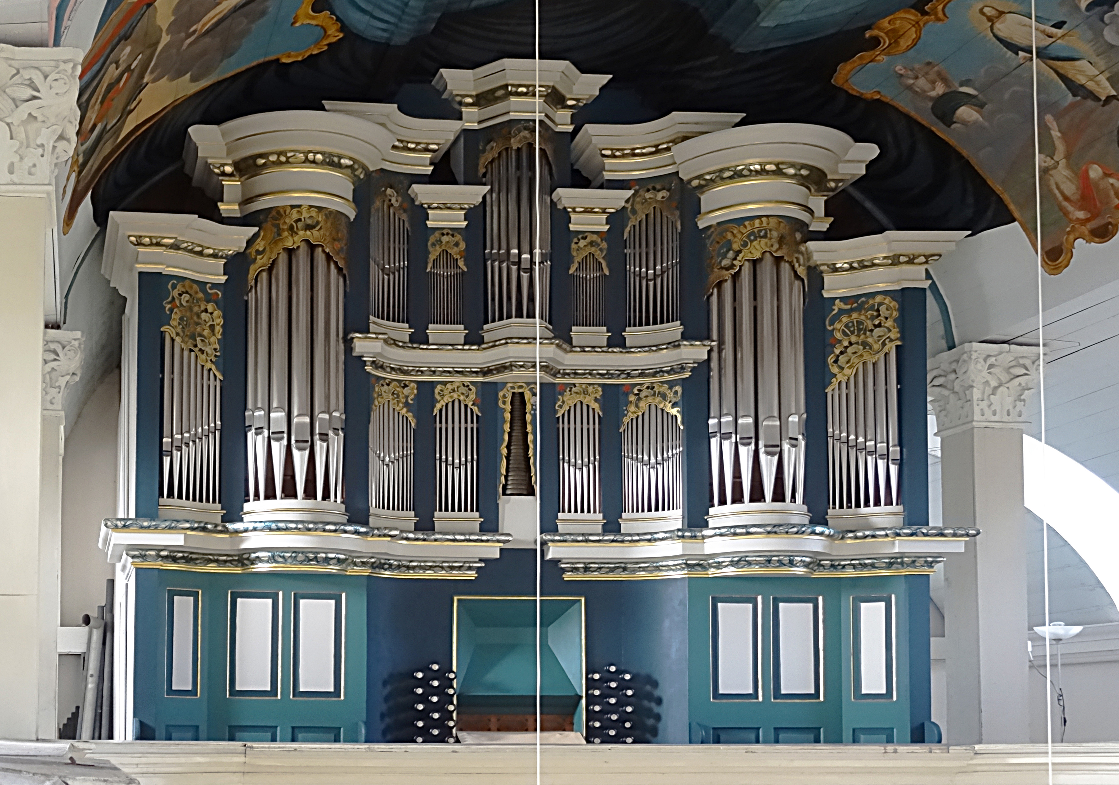 Orgel von Franciscus Volckland in St. Lukas (Bindersleben) (1751–1755 IIP/25); Umbauten + Renovierungen: 1856 durch Johann Michael Hesse und Sohn; 1948 durch Friedrich Löblig (Erfurt); 2011–2018 durch Jehmlich Orgelbau[1]